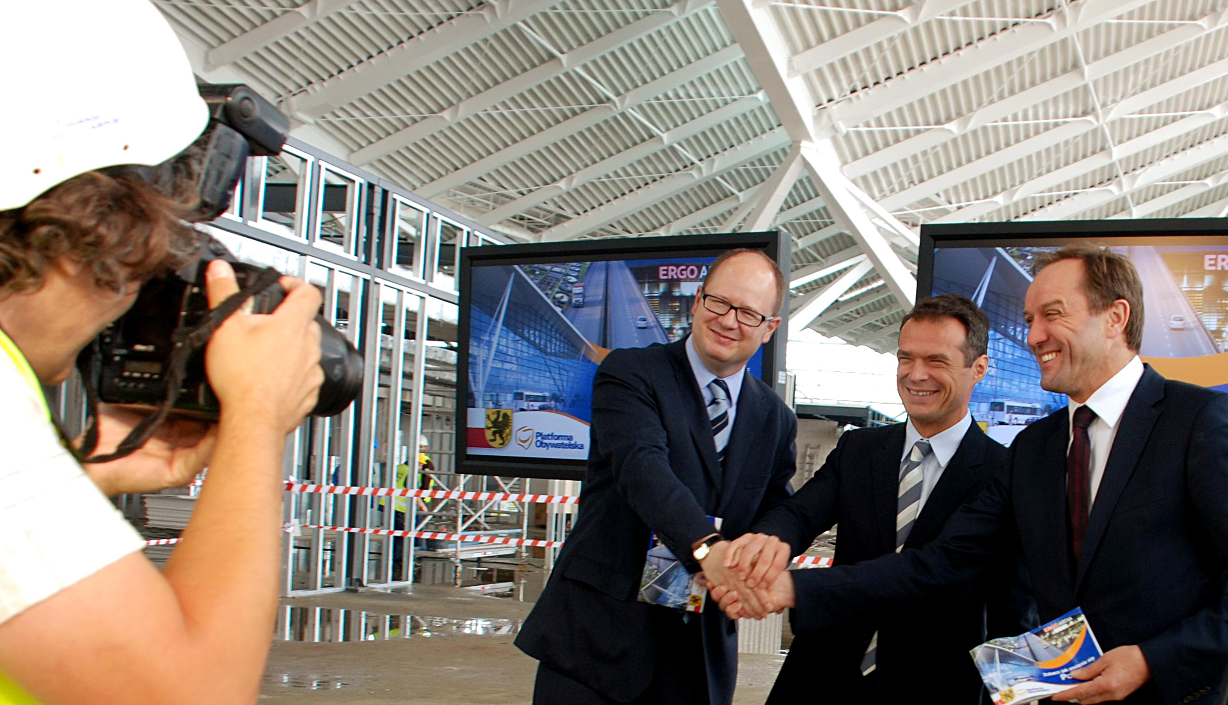 Województwo pomorskie. Paweł Adamowicz, Sławomir Nowak i Mieczysław Struk.